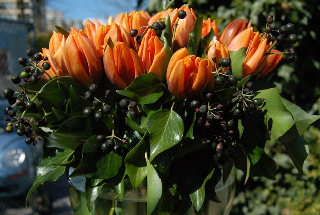 a tulip arrangement